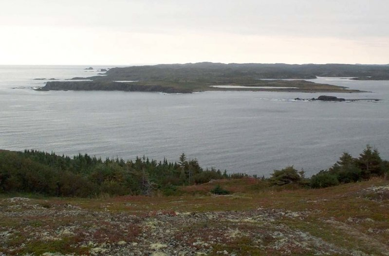 Ile de Granchain vue depuis St Lunaire (Canada)